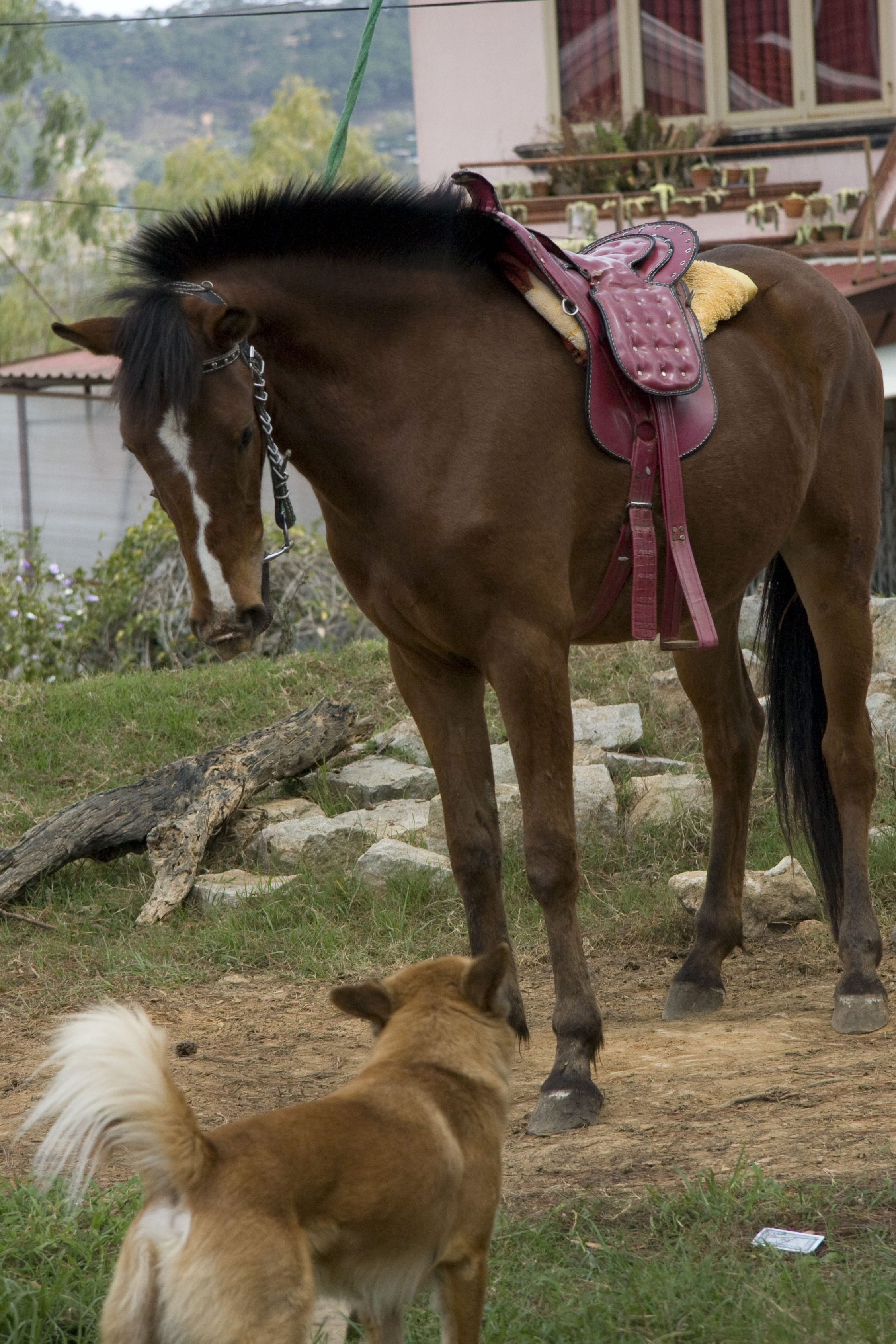 Can we be friend ?